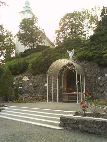 Kaplnka sv. Anny a votívna jaskyňa